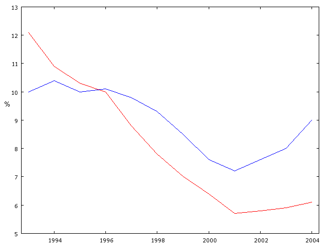 A munkanélküliségi ráta alakulása Magyarországon 1992 és 2004 között